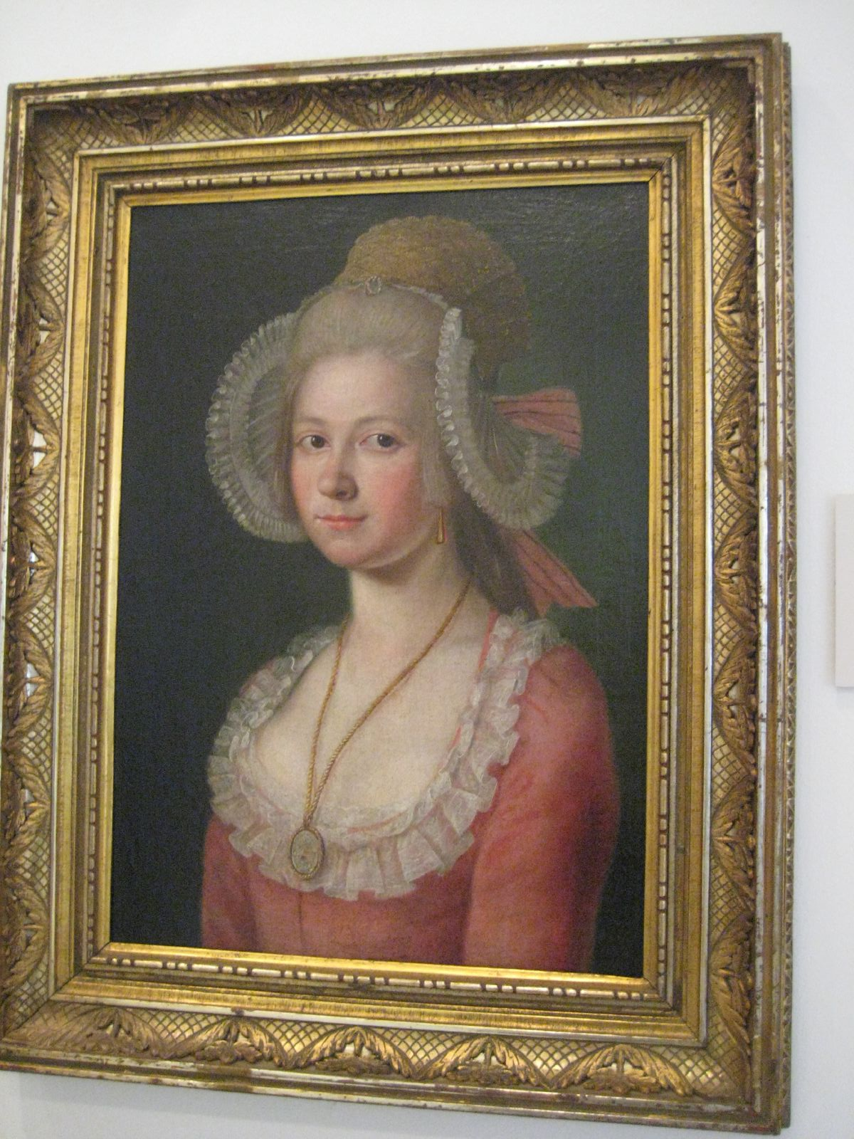 painting